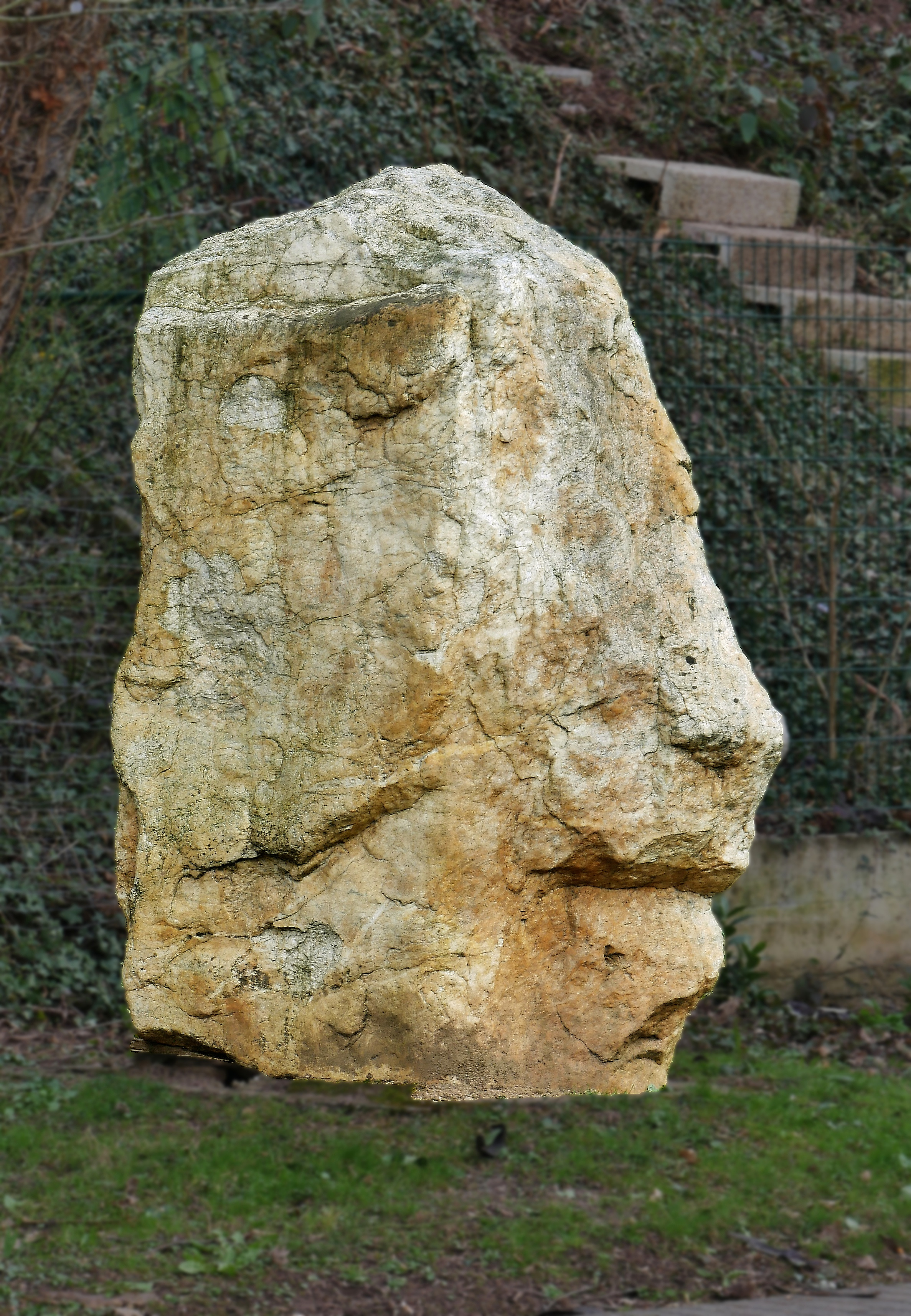 Der Menhier "Weisser Wacken" in Konz, Stadtteil Berensborn an der Quelle "Berensborn"